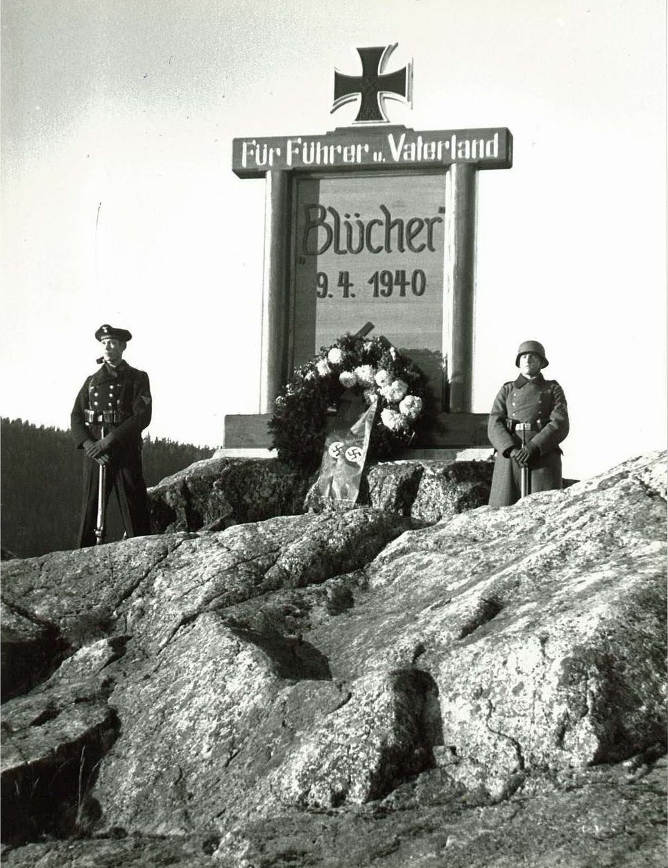 Kildeinformasjon: NTBs krigsarkiv, Digitaliserte dokumenter (RA/PA-1209/Ud/L0073/0004), 0-, oppb: Riksarkivet. Merknader: Blücher senket ved Oscarsborg. Permanent sidelenke: Permanent bildelenke: Minnesmerket over falne tyskere etter «Blüchers» forlis 9. april 1940 ble reist på Askholmene i Drøbaksundet 20. mai samme år. Støtten ble tatt ned ved freden i mai 1945. Teksten «Für Führer u. Vaterland» betyr «For fører o. fedreland».